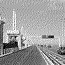 voorbeeld gif dithering, eigen foto, eigen werk.